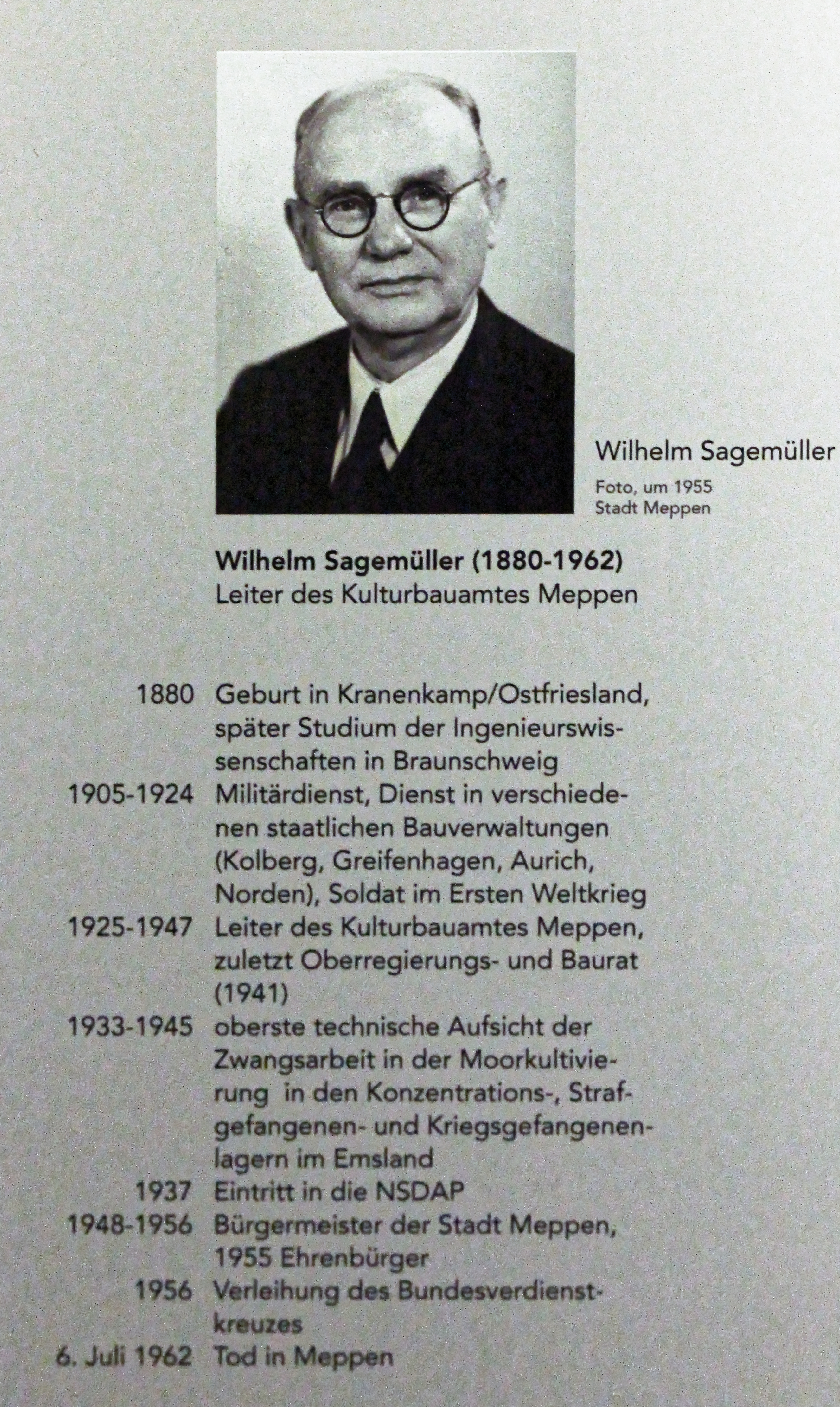 Tafel zu Wilhelm Sagemüller in der Gedenkstätte Esterwegen